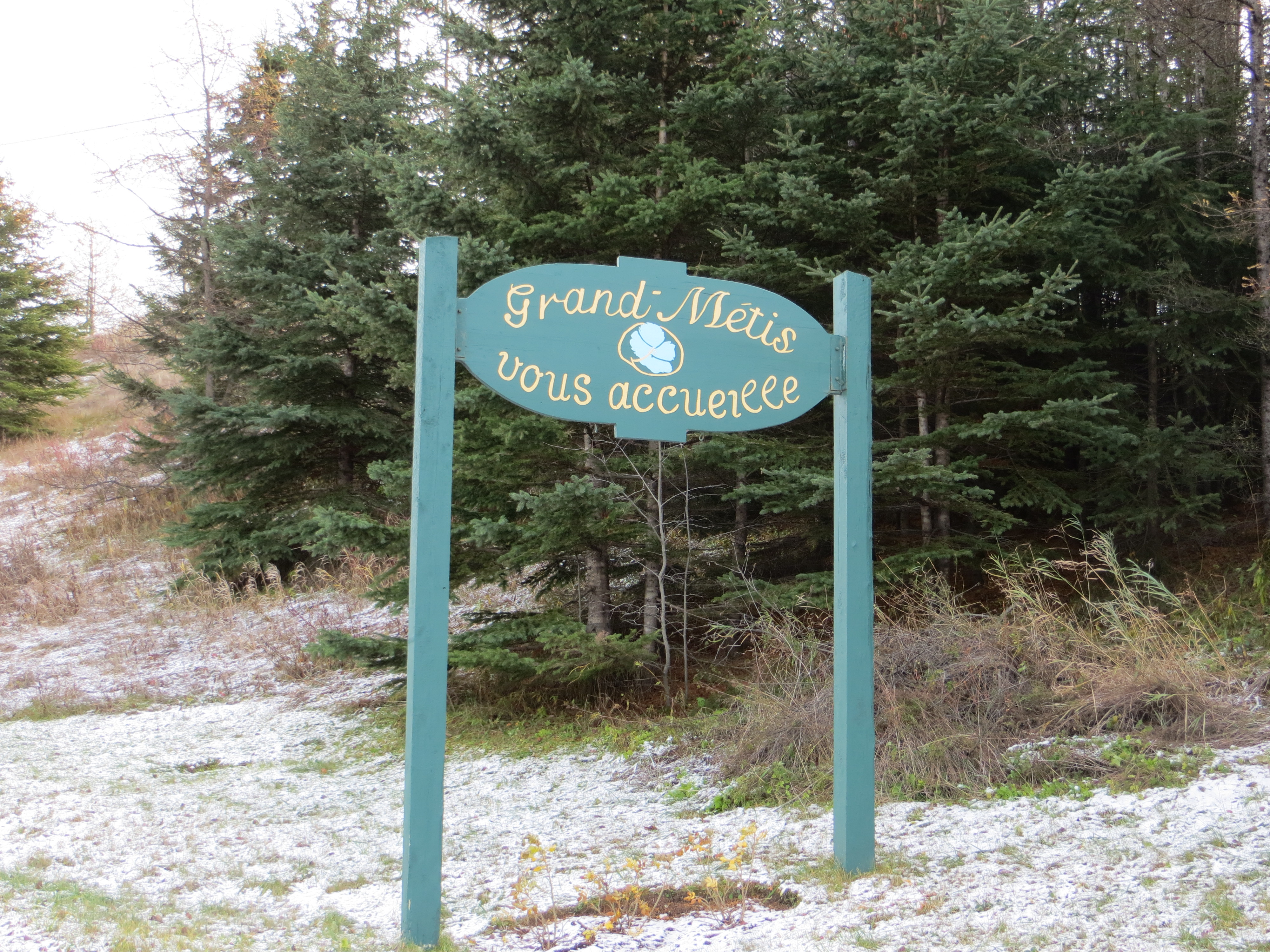 Aviso de bienvenida de Grand-Métis.